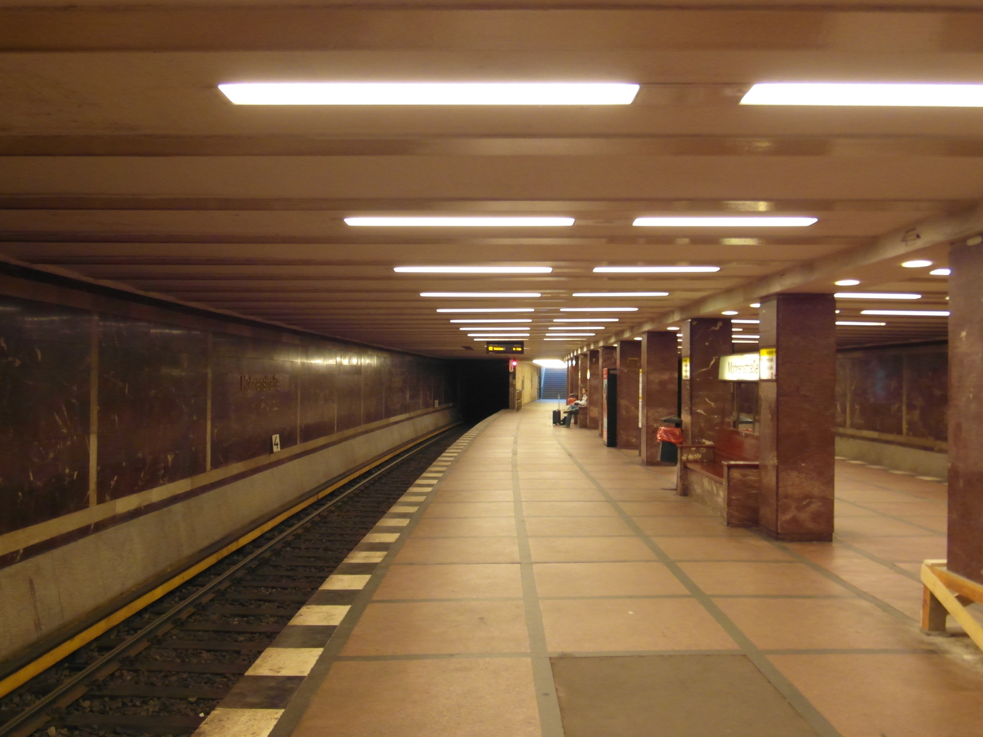 Linie U2